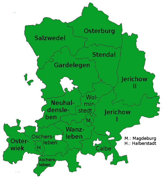 Административное деление прусского округа Магдебург (1820)